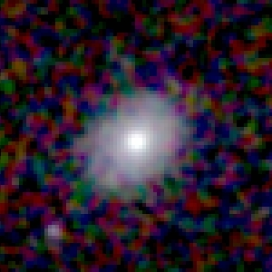 Galaxy NGC 62